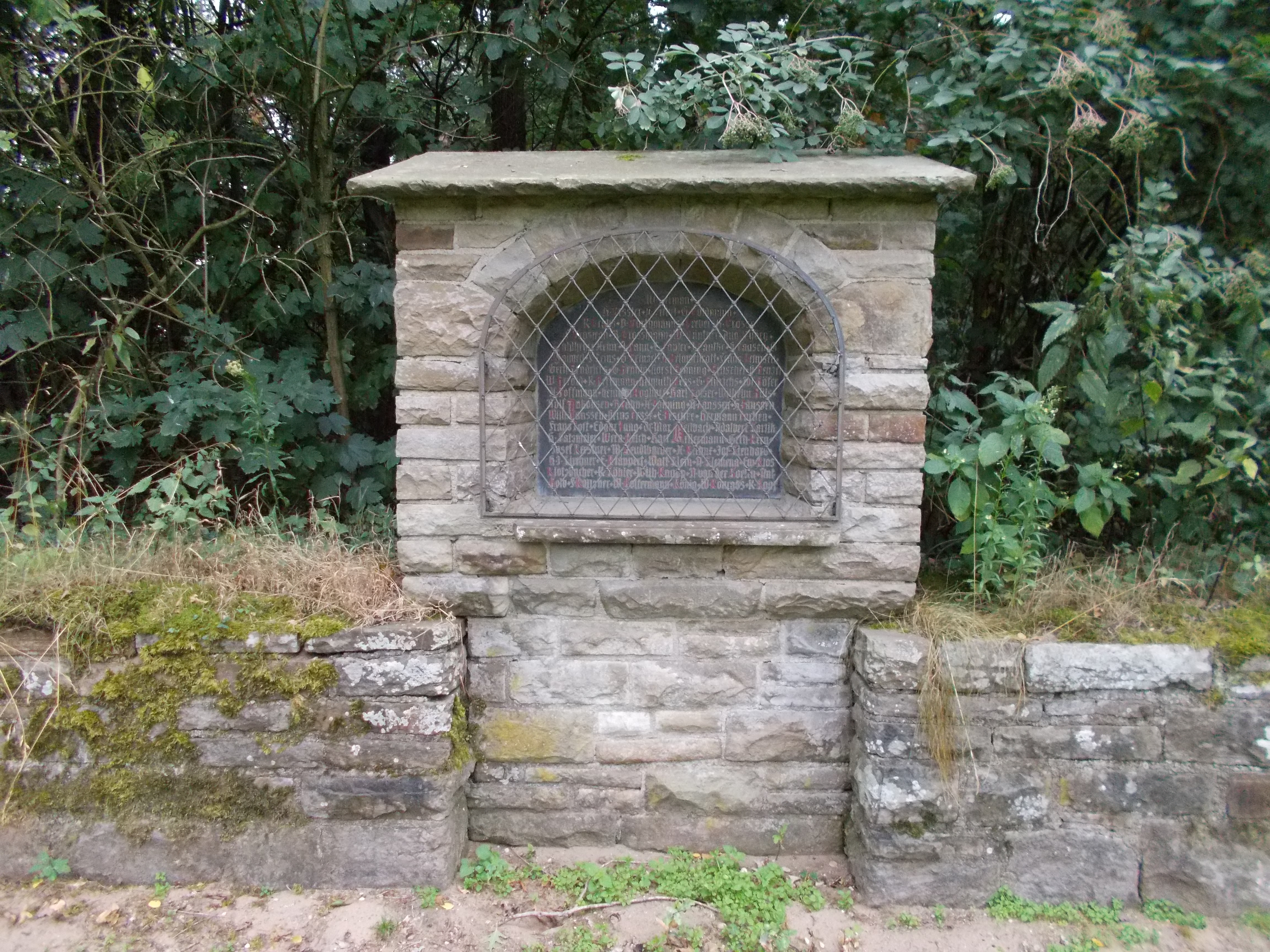 An der Friedhofsmauer gibt es 5 Gedenkschreine mit den Namen verschollener und vermisster Soldaten. Sie sind auf Ruhrsandsteintafeln geschrieben. Einige der Soldaten konnten inzwischen identifiziert werden.